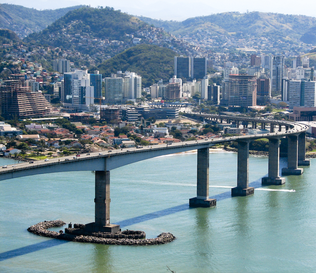 Terceira Ponte, entre em Vila Velha e Vitória, Espírito Santo, Brasil, usando uma Canon PowerShot S2 IS.